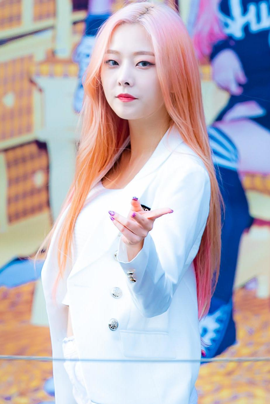 180617 프리스틴V 팬사인회